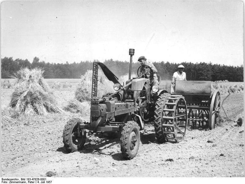 Pätz, Aussaat Zentralbild Zimmermann Son-Qu 4.7.1957 MTS Pätz auf die Ernte gut vorbereitet Die vier Mähdrescher der MTS Pätz (Kreis KönigsWusterhausen) vom Typ " Patriot "sind einsatzbereit. Den Mähdrescherführern sin die Einstzpläne für den gesamtenErnteablauf bekannt. Sie wurden gemeinsam mit den LPG " Johannes R. Bocher "in Mittenwald, "Aufbau" in Gussow und der LPG " Deutsch-Sowjetische Freundschaft " in Schenkendorf erarbeitet. Die MTS arbeitet zur Zeit in Tag- und Nachtschichten. Schon 48 Stunden nach Rapsmahd beginnt die Aussaat der Zwischenfrucht, bestehend aus Mais, Süßlupins, Sonnenblumen und Wicken ( zum Rinsilieren ). Durch die schnelle Bodenbearbeitung wir die natürliche Bodenfeuchtigkeit erhalten. UBzDer Universalträger RS 15 bei der Zwischenfruchtaussaat auf dem Feld der LPG " Aufbau ".